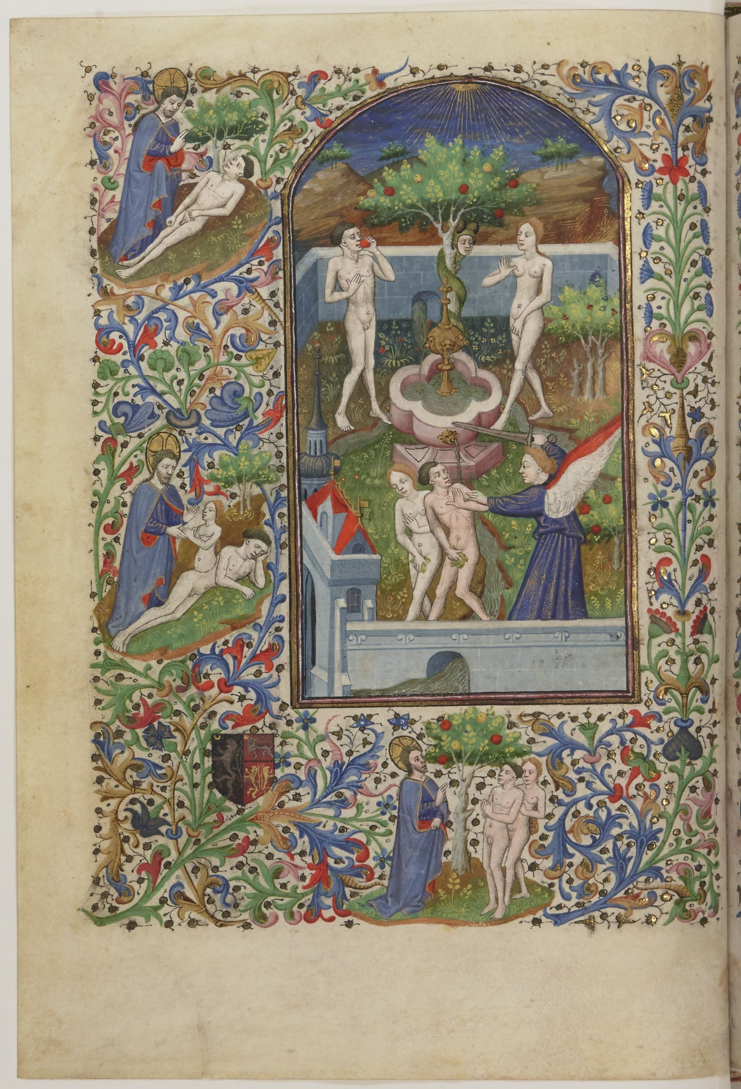 . HORAE Beatae Mariae Virginis. Ms. in-4 sur vélin de 171 f. (haut. 212 ; larg. 148 mm.), velours r., tr. dor. (Rel. moderne.)